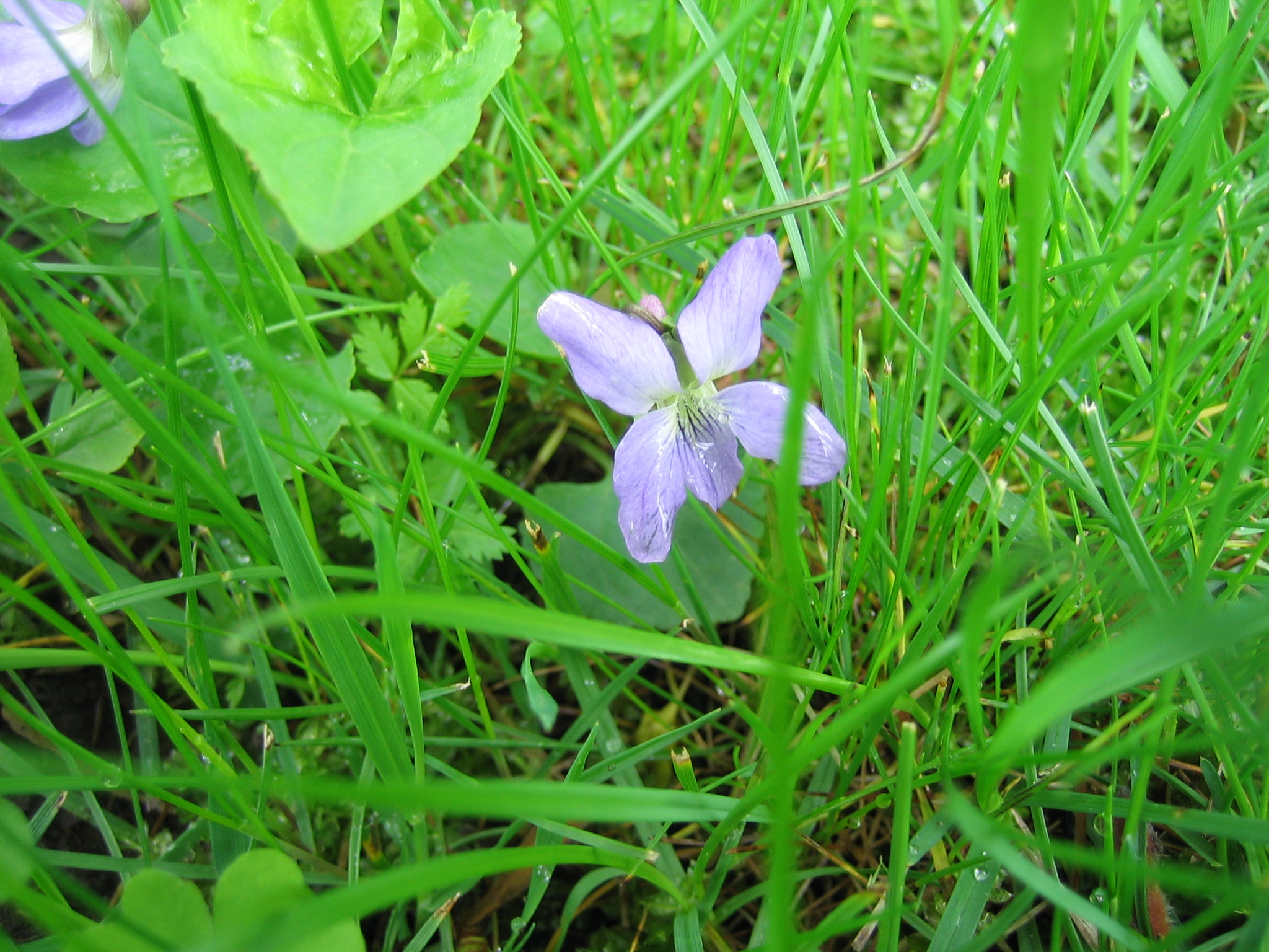 Dog violet